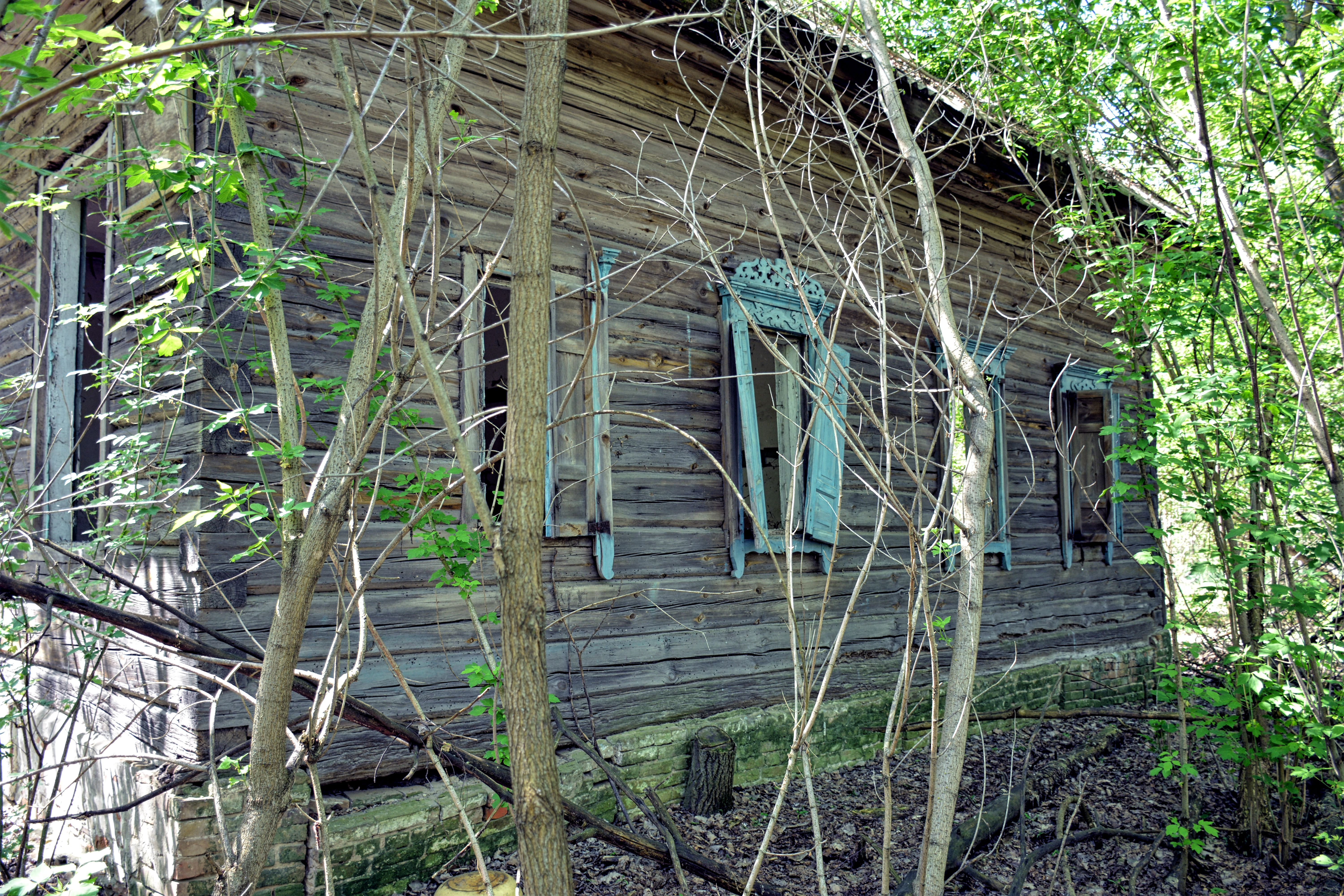 фото_7. Школа